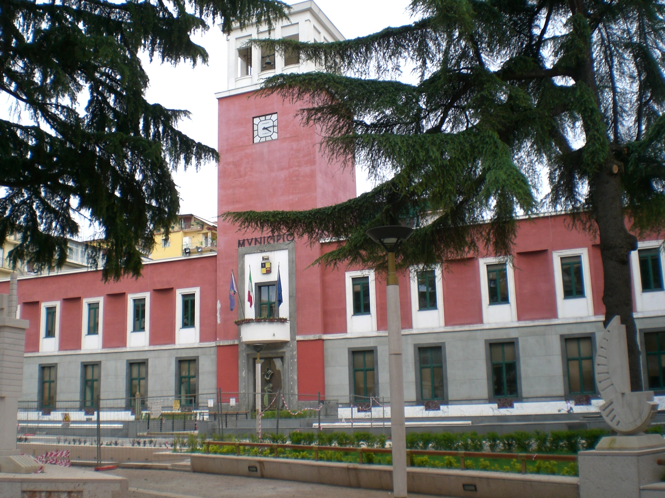 Municipio di Battipaglia